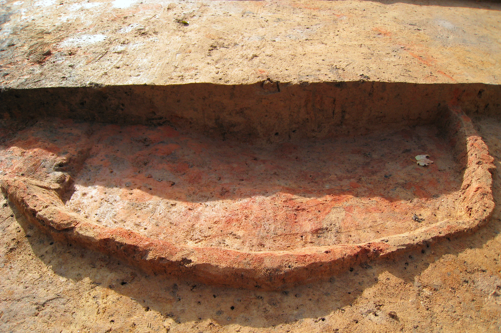 Ausgrabung auf dem Areal des Römerlagers Porta Westfalica mit römischem Feldbackofen